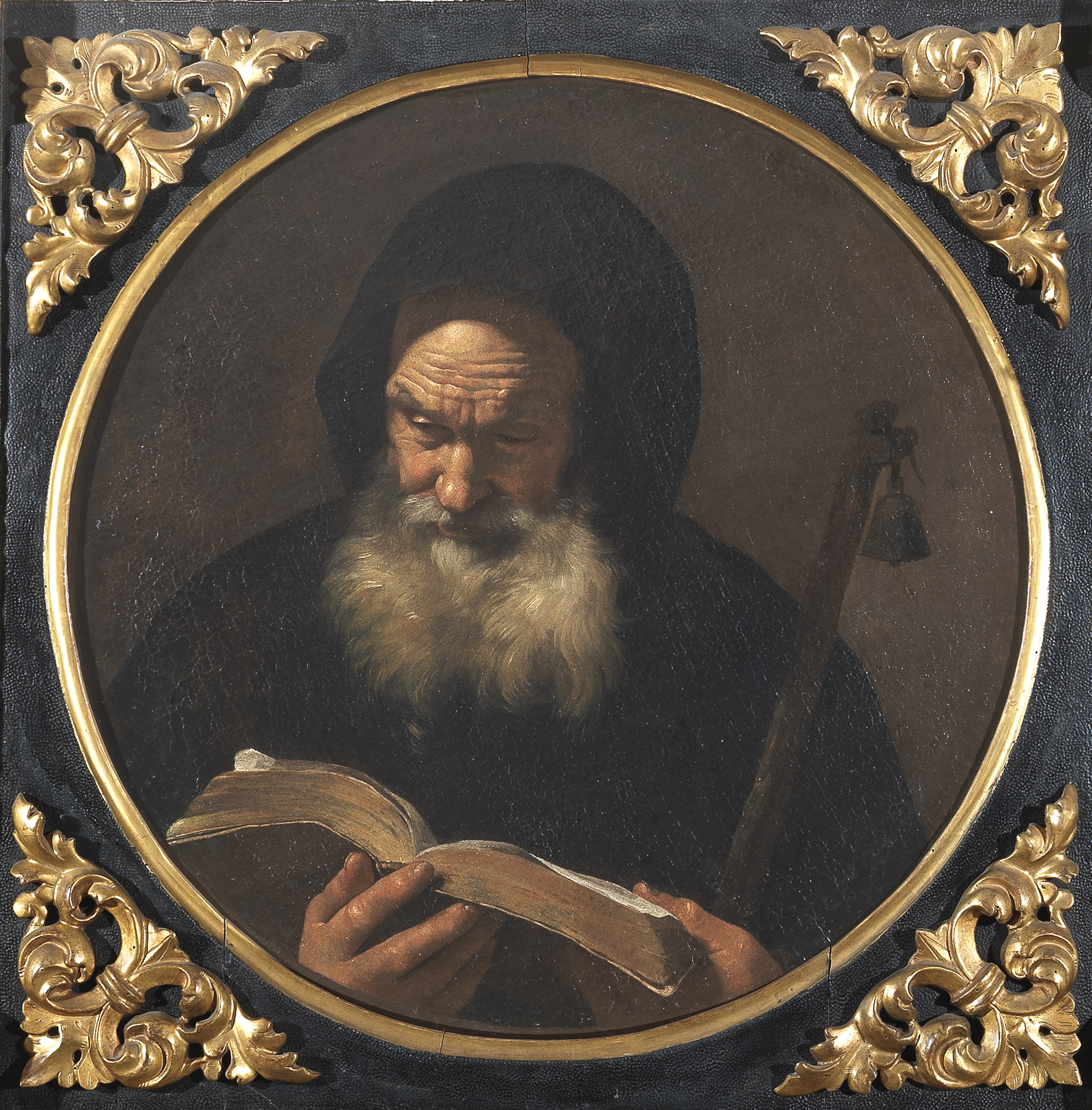 Sant’Antonio Abate Olio su tela 62 x 62 cm Collezione M, (Collezione privata)